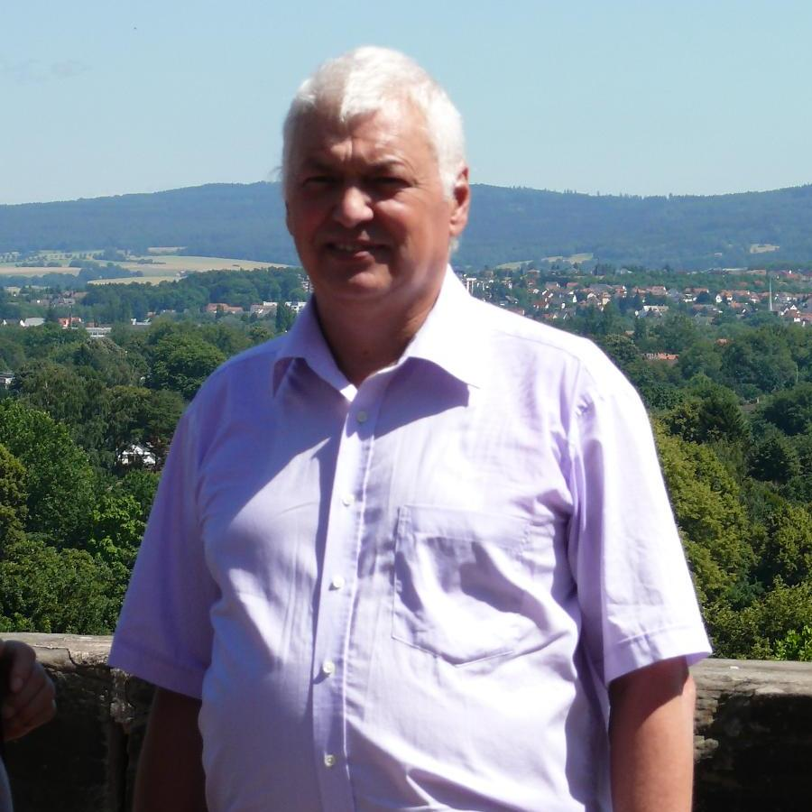 Horst Arnold in Kassel kurze Zeit nach Verkündigung seines Freispruchs im Wiederaufnahmeverfahren